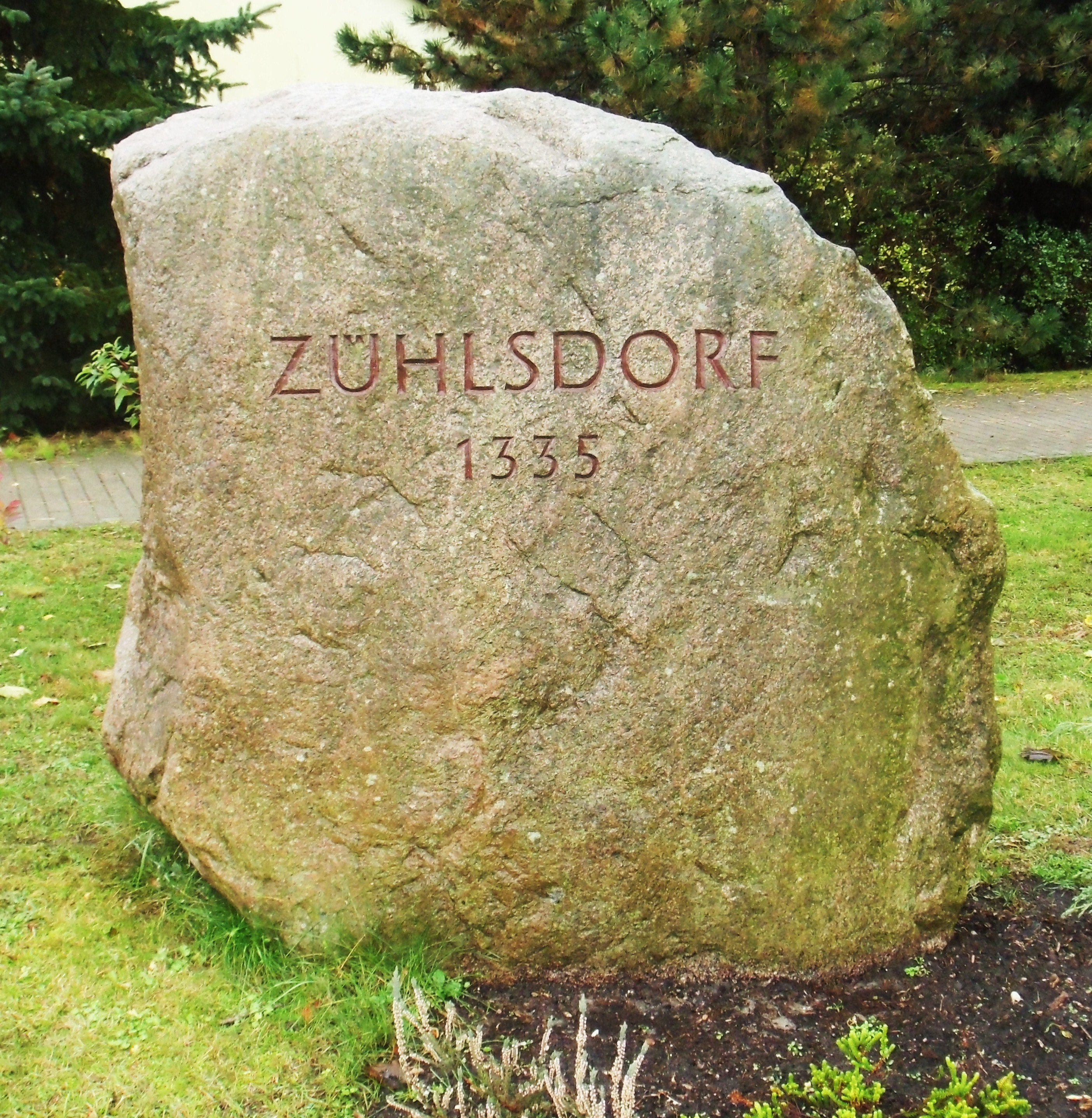 Findlingsstein aus der Eiszeit am Ortseingang von Zühlsdorf mit dem Gründungsjahr des Ortes 1335